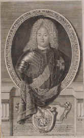 Marquard Ludwig Freiherr von Printzen prussian politician und diplomat.